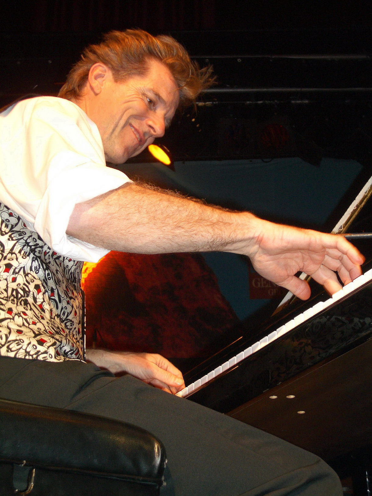 Che Peyer, Die Boogie-Woogie und Blues Pianolegende am Flügel 2005